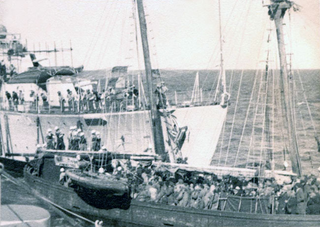 האונייה אורד וינגייט בנמל חיפה לאחר לכידתה, 1946